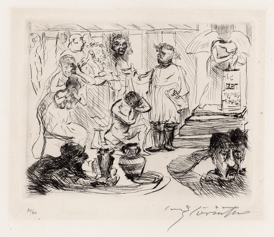 Hic Jacet Eximus Trimalchio (Blatt 12 des Zyklus "Das Gastmahl des Trimalchio"). Kaltnadel, 13,9 x 17,8 cm (Plattenrand), 1919